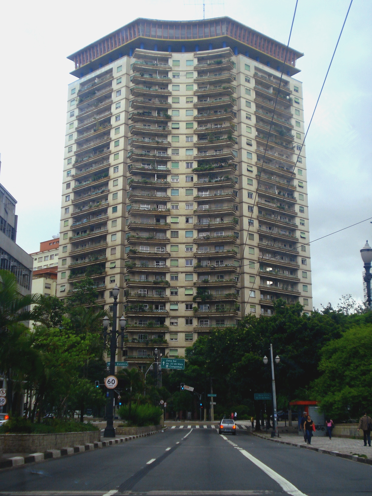 Av. São Luis